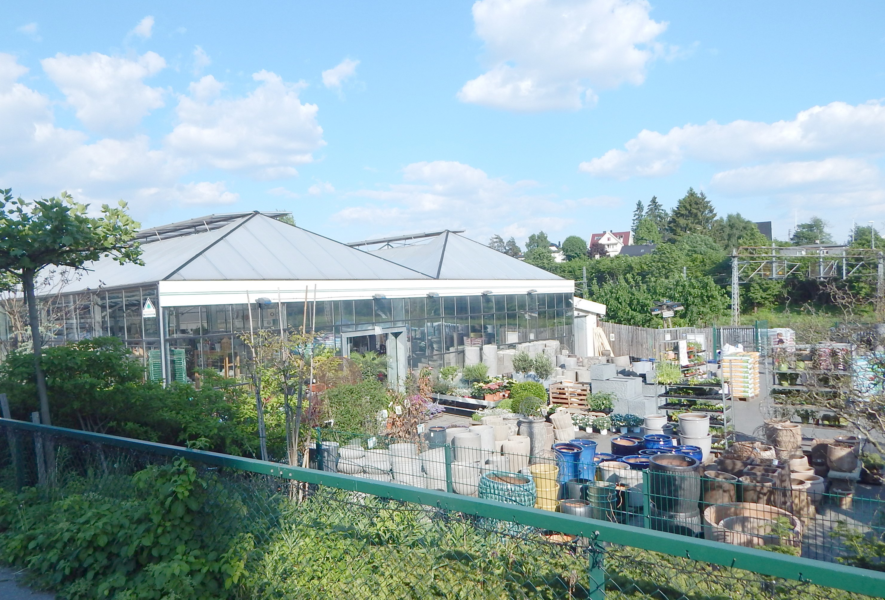 J Olsens Enke i Sigurd Iversens vei